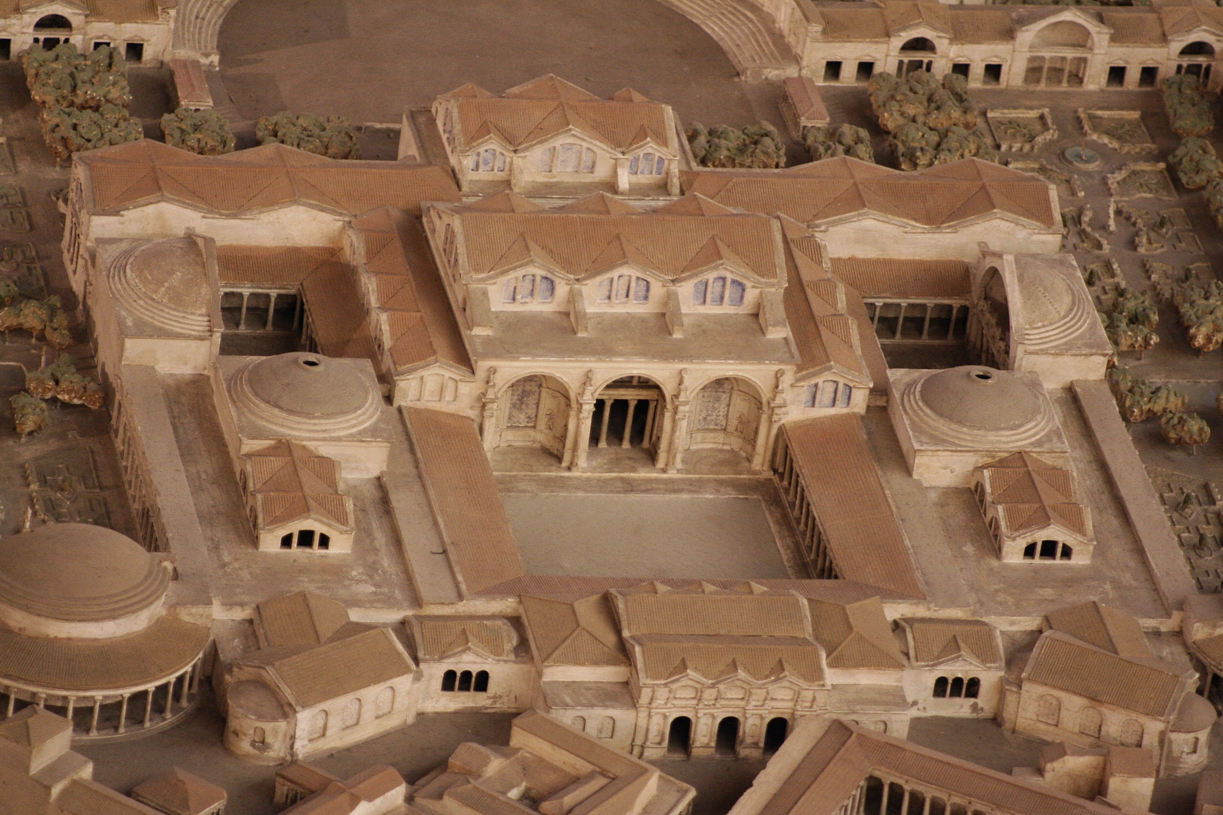 Thermes de Trajan sur la maquette d'I. Gismondi. Museo della Civilta Romana, EUR, Rome.